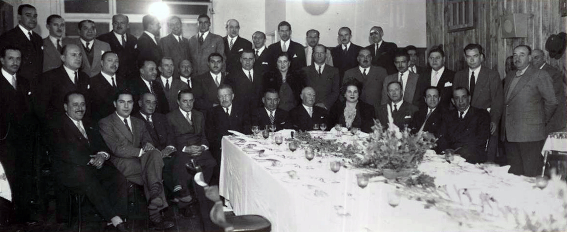 Reunión del Partido Agrario Laborista (PAL) con el recientemente electo senador por Santiago, Carlos Ibáñez del Campo, triunfador con la primera mayoría en las elecciones parlamentarias de marzo de 1949 donde contó con el apoyo del PAL. Abril 1949